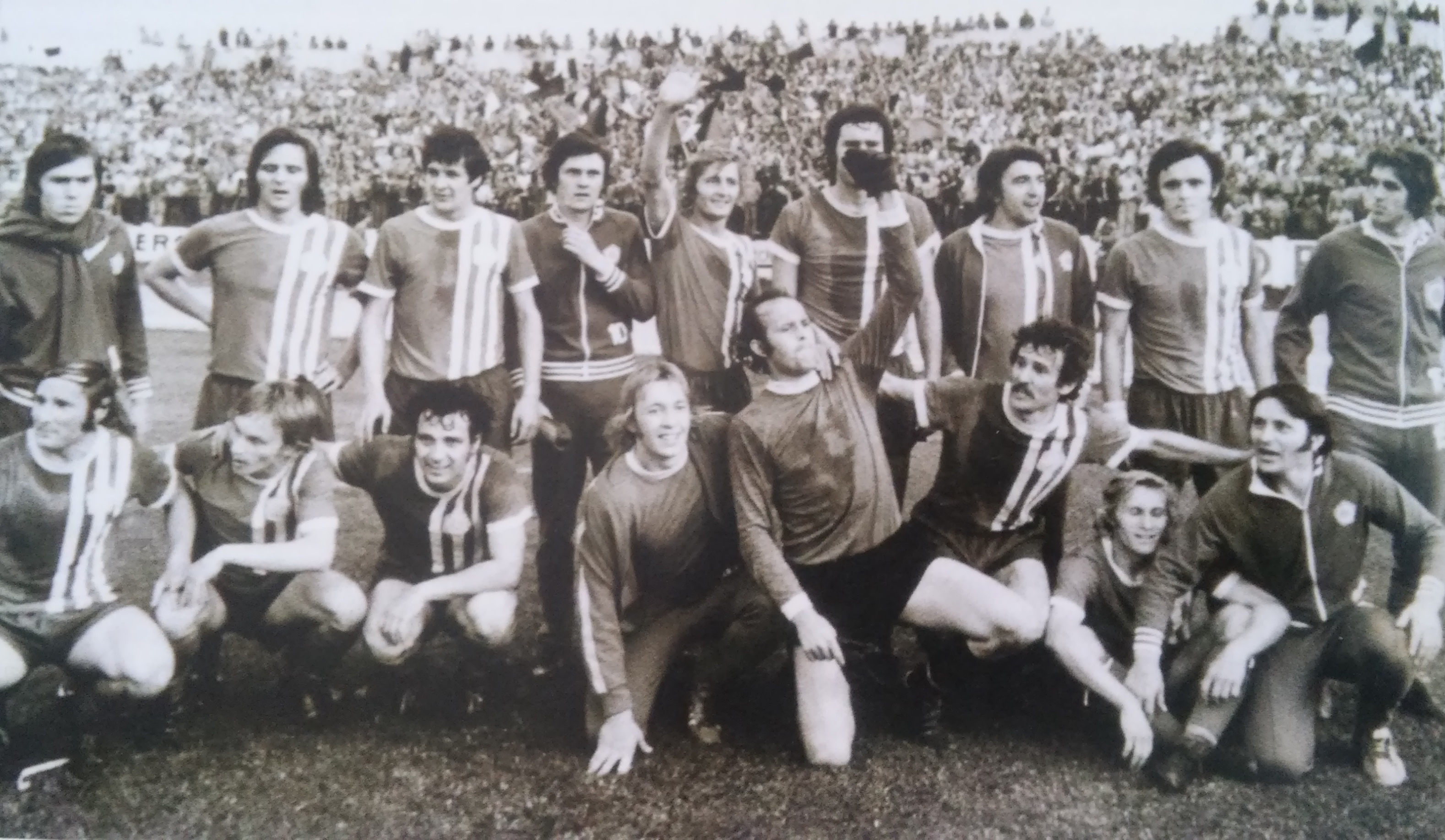 Mužstvo Slovana Bratislava z toku 1975.